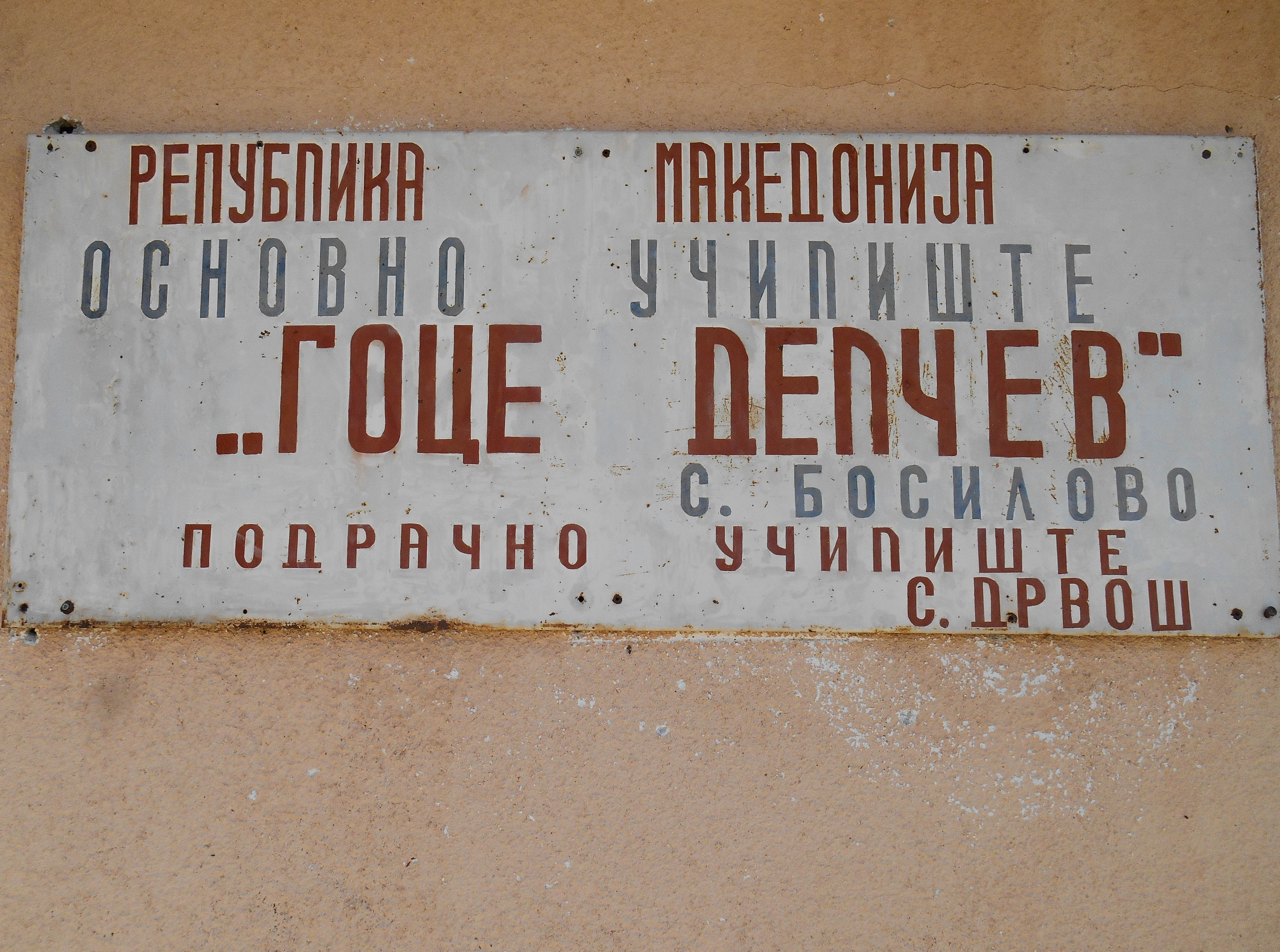 Основно училиште „Гоце Делчев“ - Дрвош